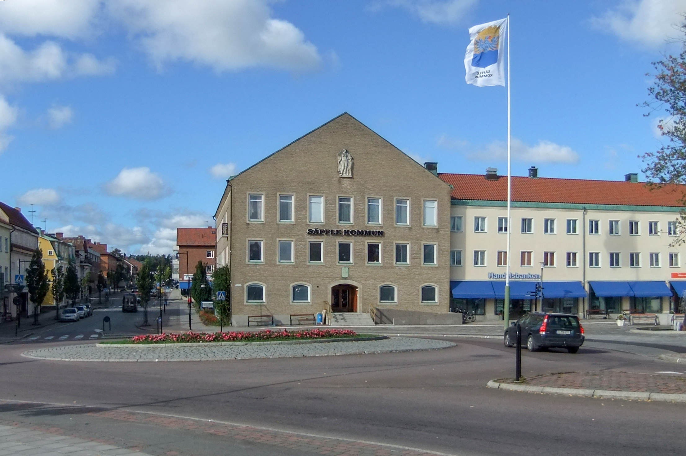 Säffle stadshus från öster. Till höger skymtas Kanaltorget och gatan till vänster i bild är Västra Storgatan.